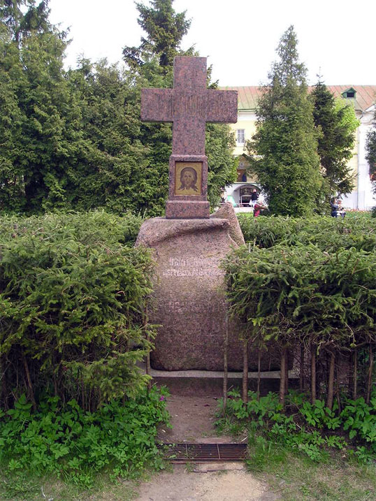 Ivan Aksakov's gravestone in Troitse-Sergiyeva Lavra